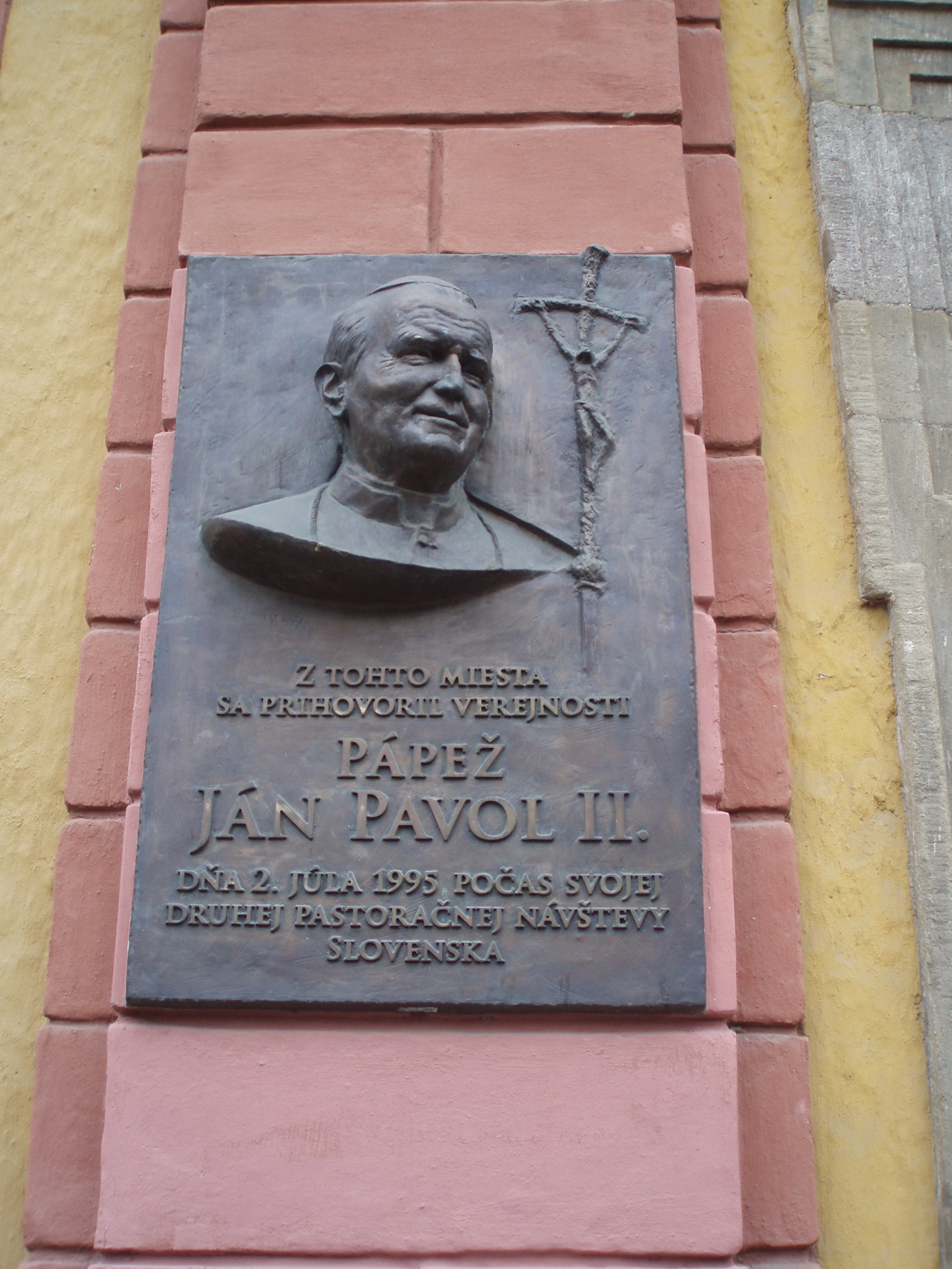 II. János Pál pápa emléktábla Kassán, a Fő utcán